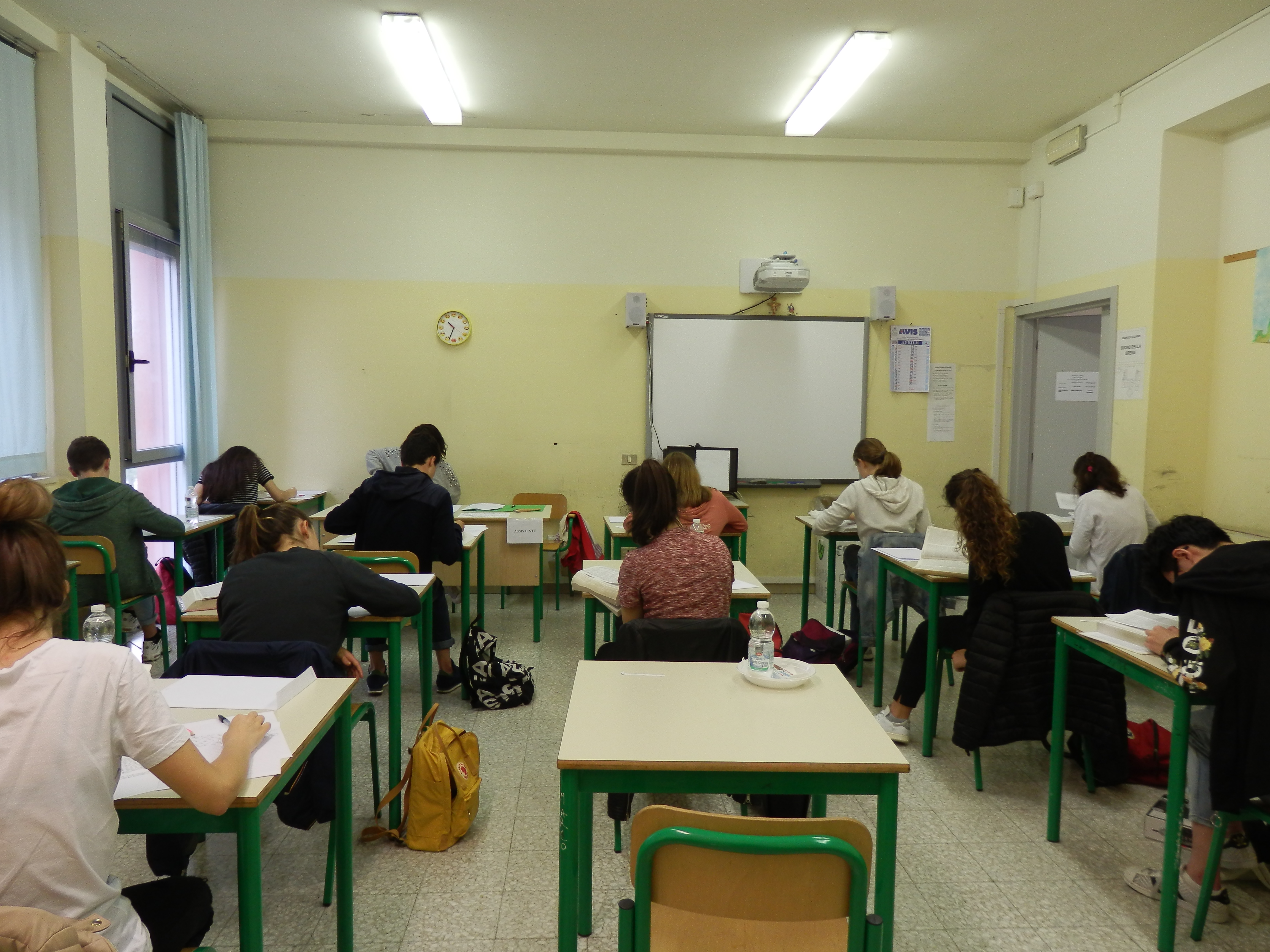 Edizione 2018 Certamen in Ponticulo Herae, Pontedera, Liceo Classico XXV Aprile, ex Liceo Andrea da Pontedera.